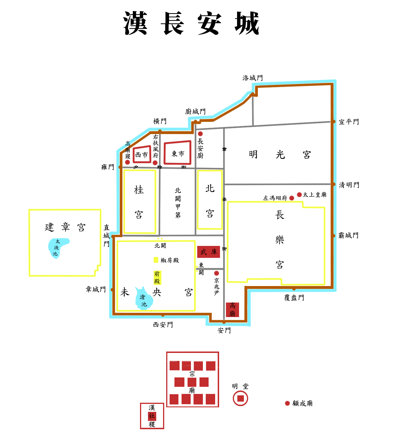 中文（中国大陆）: 汉长安城图